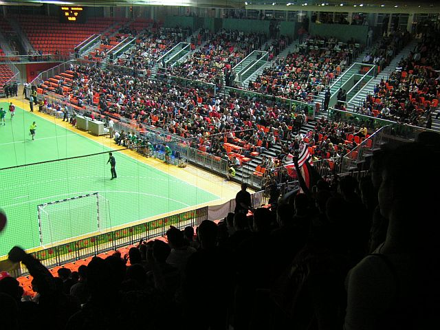 Gradska arena Zenica